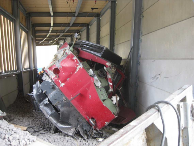 Trümmer der am 8. September 2011 verunfallten Lokomotive HGe 2/2 3 der Chemin de fer Montreux–Glion–Rochers de Naye